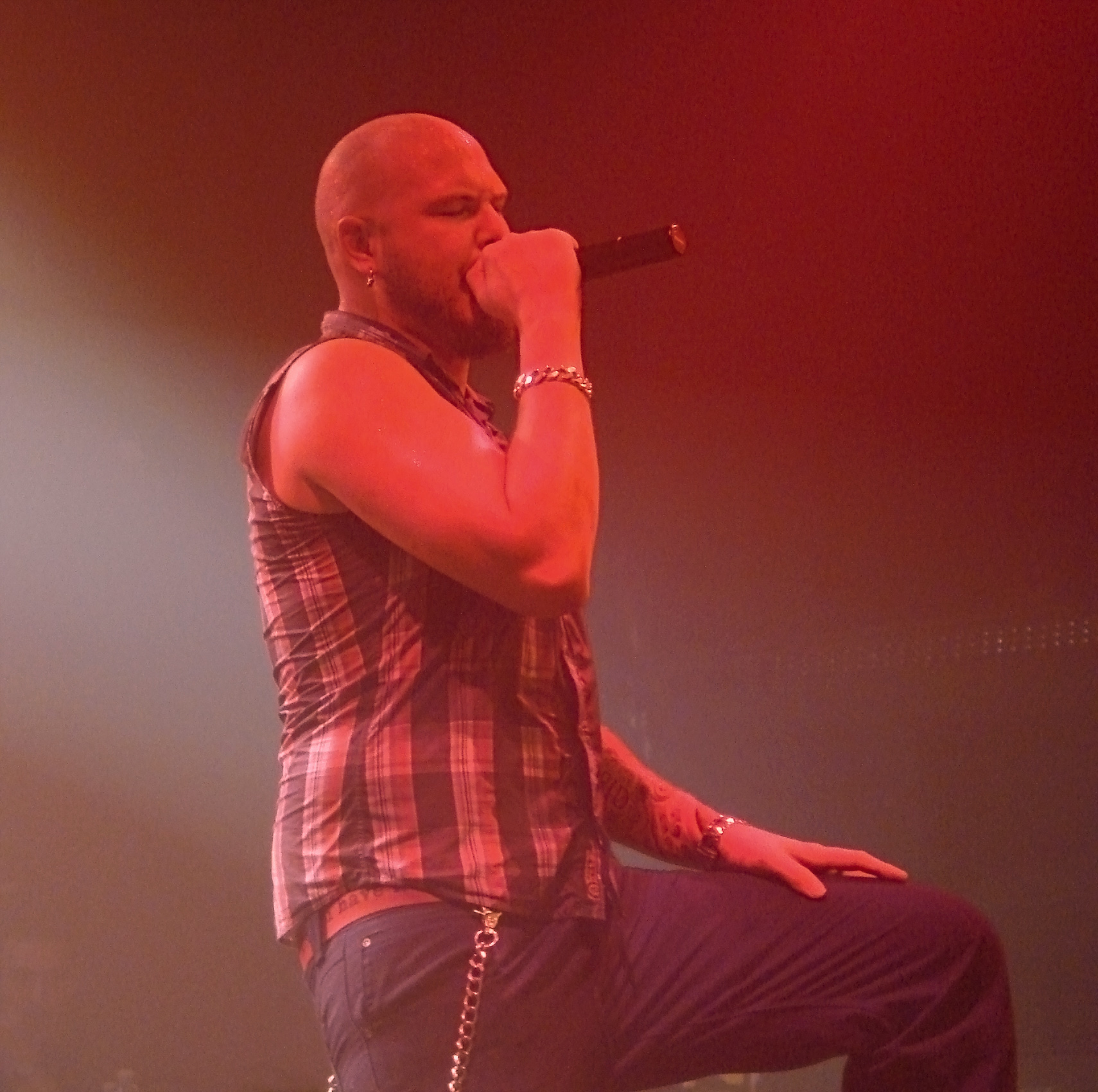 Soilwork en concert à Paris, à la Locomotive, le 12/10/07.